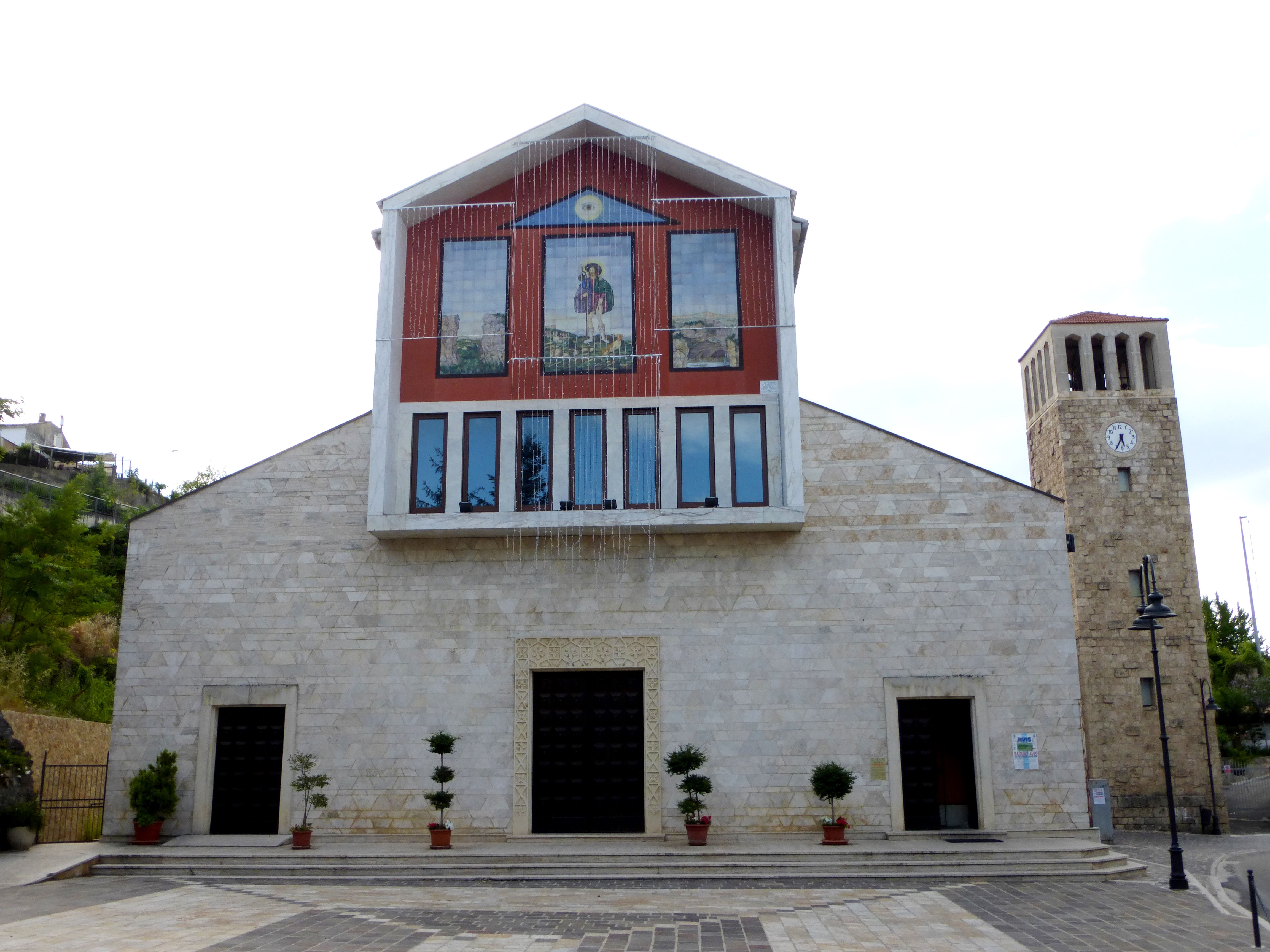 Chiesa di San Rocco, Roccamontepiano, Chieti.